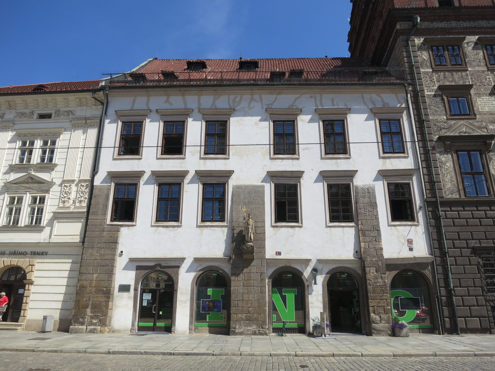 Exteriér Císařského domu